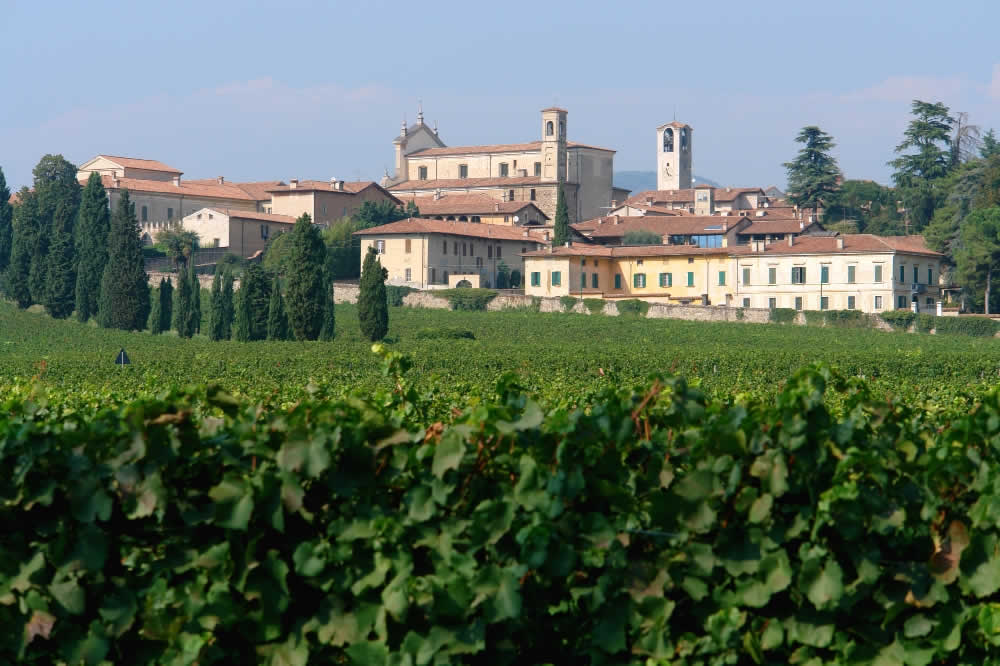 Vista sui vigneti entrando ad Erbusco